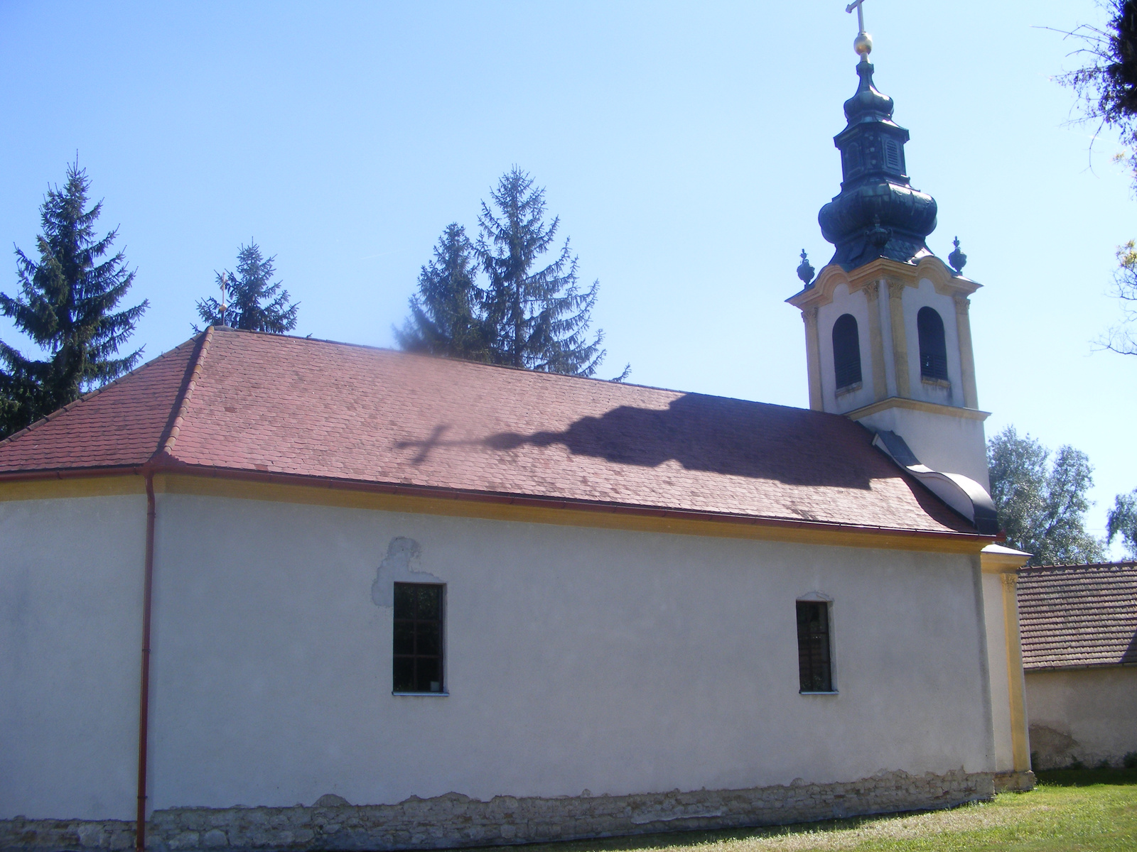 Görögkeleti templom (Lórév, Csarnojevics u. 39. (falu széle)) This is a photo of a monument in Hungary. Identifier: 7116